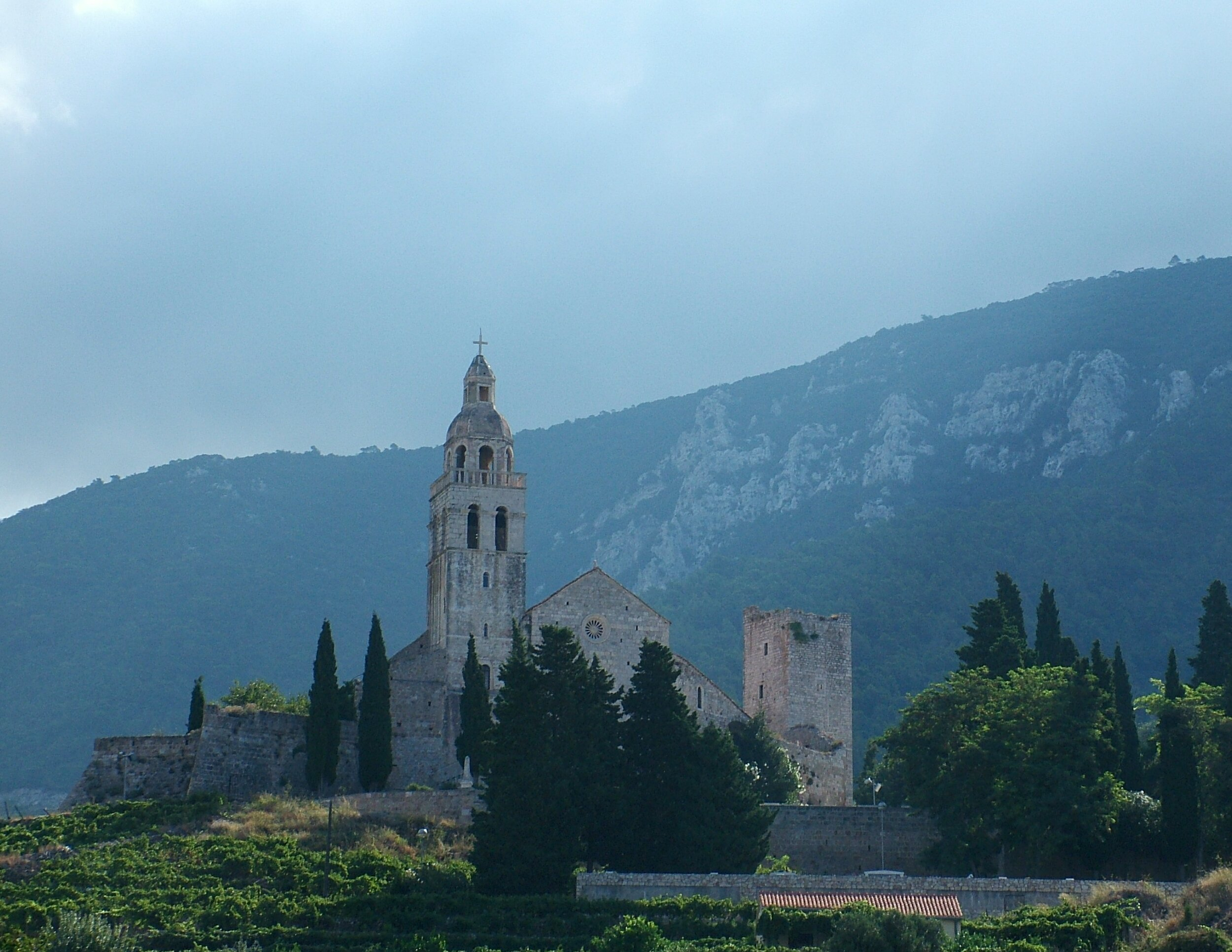 Klasztor Benedyktynów w Komizy na Vis